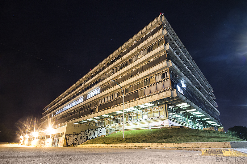 FADU - Universidad de Buenos Aires